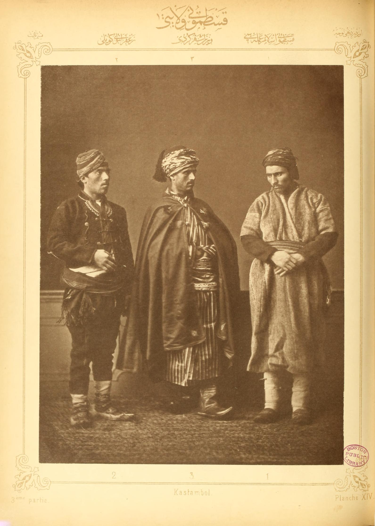 VILAYET DE CASTAMBOL PLANCHE XIV : Ouvrier turc de Castambol Paysan de Zafranbol Kurde de Viranchehr